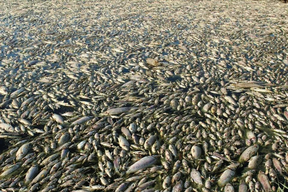 Atibaia 2014-02-19 - Seca no Rio Atibaia (3)